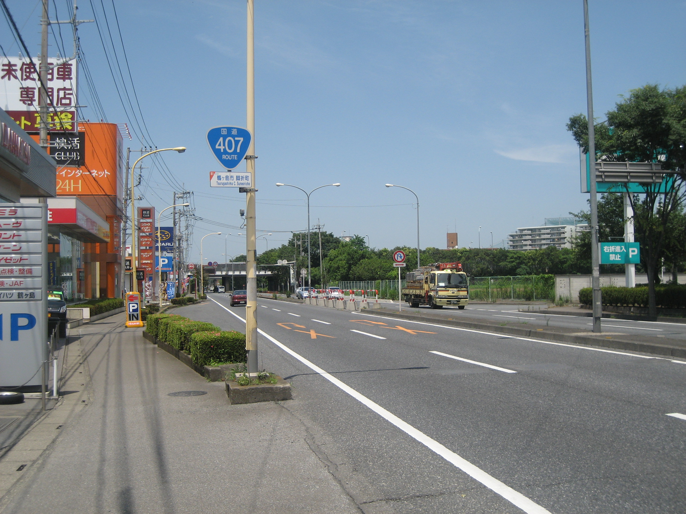 国道407号線埼玉県鶴ヶ島市鶴ヶ島IC付近